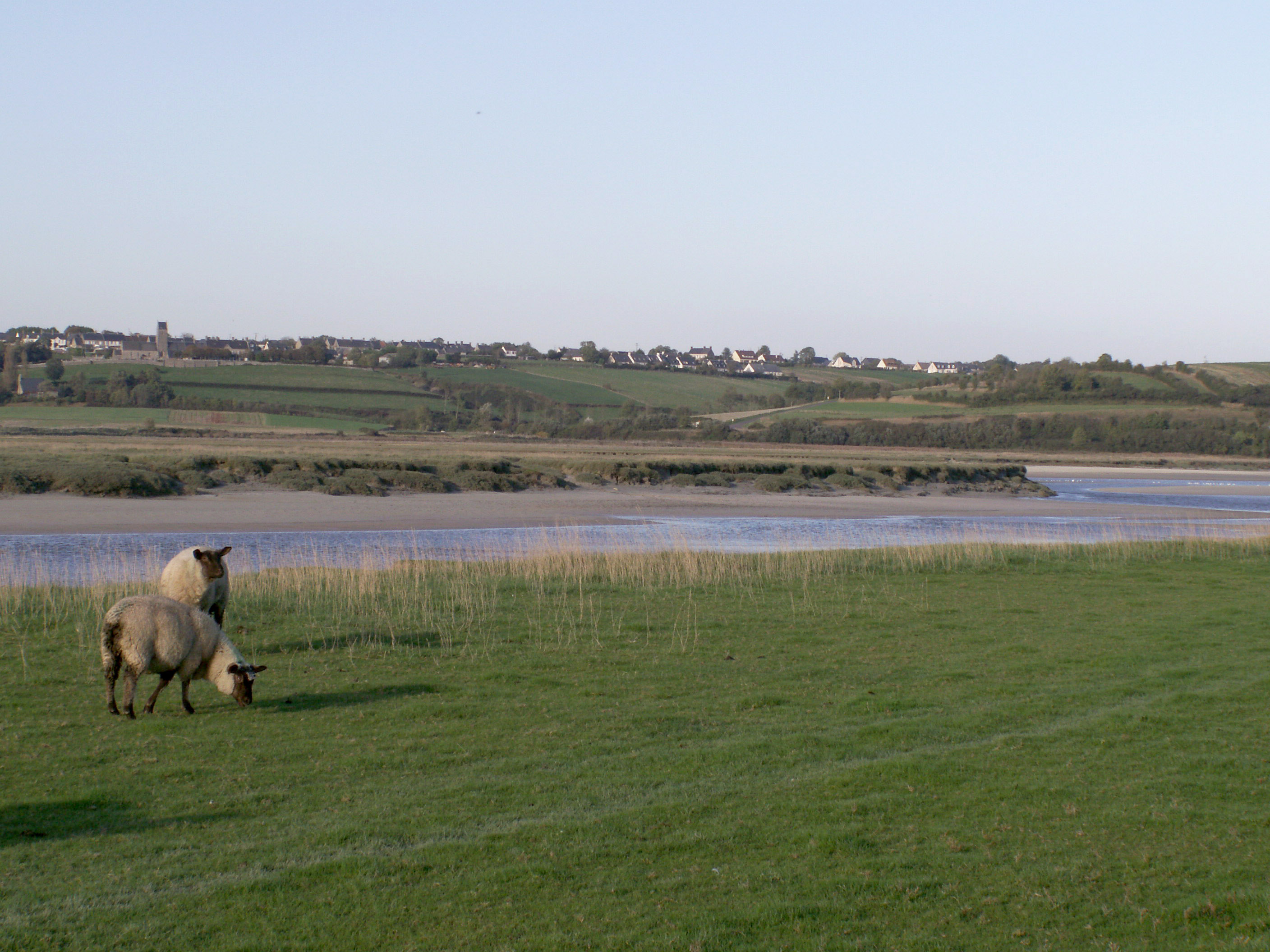 Havre de Regnéville, Manche, France